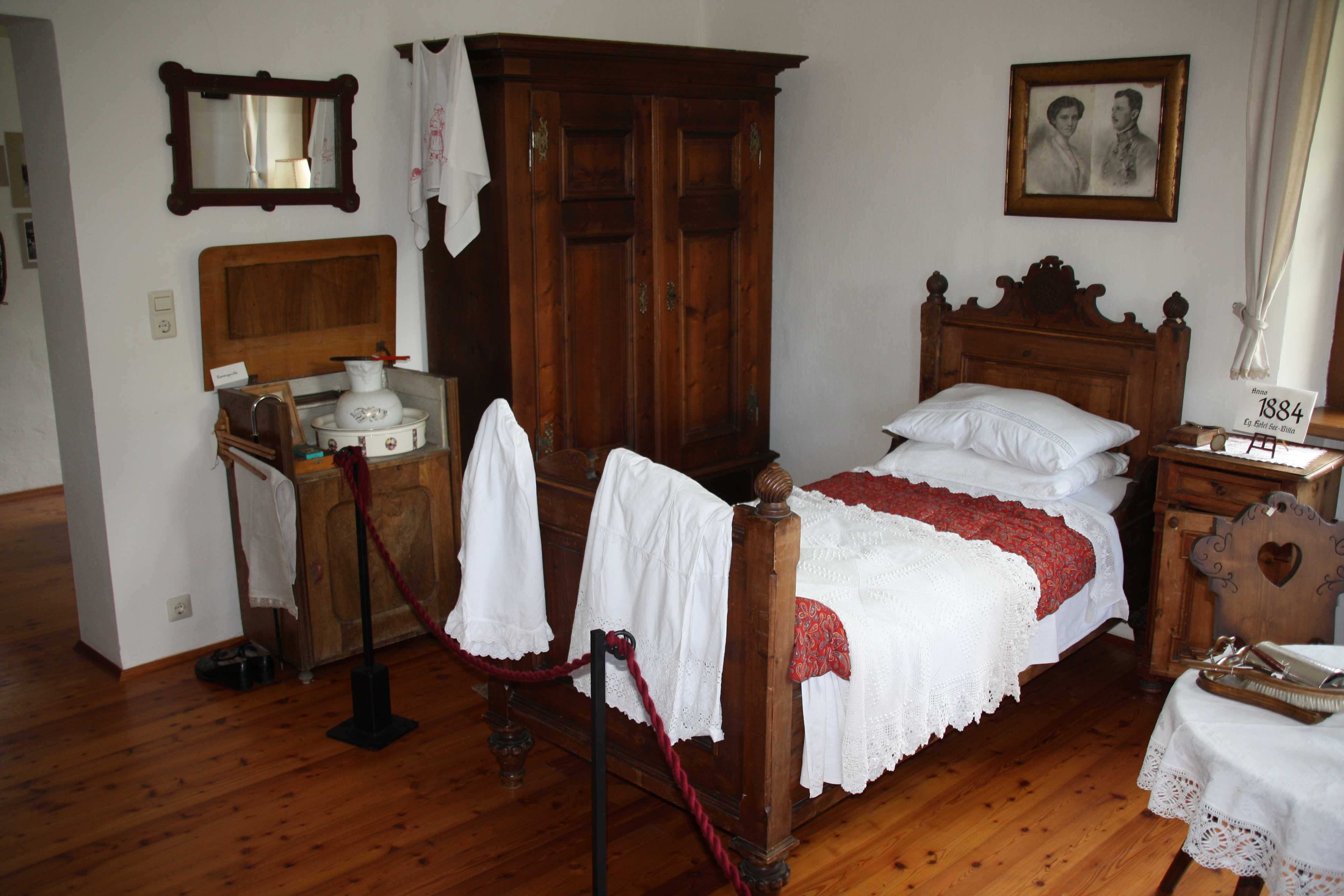 Schlafzimmer im Heimatmuseum Obermillstatt, Kärnten